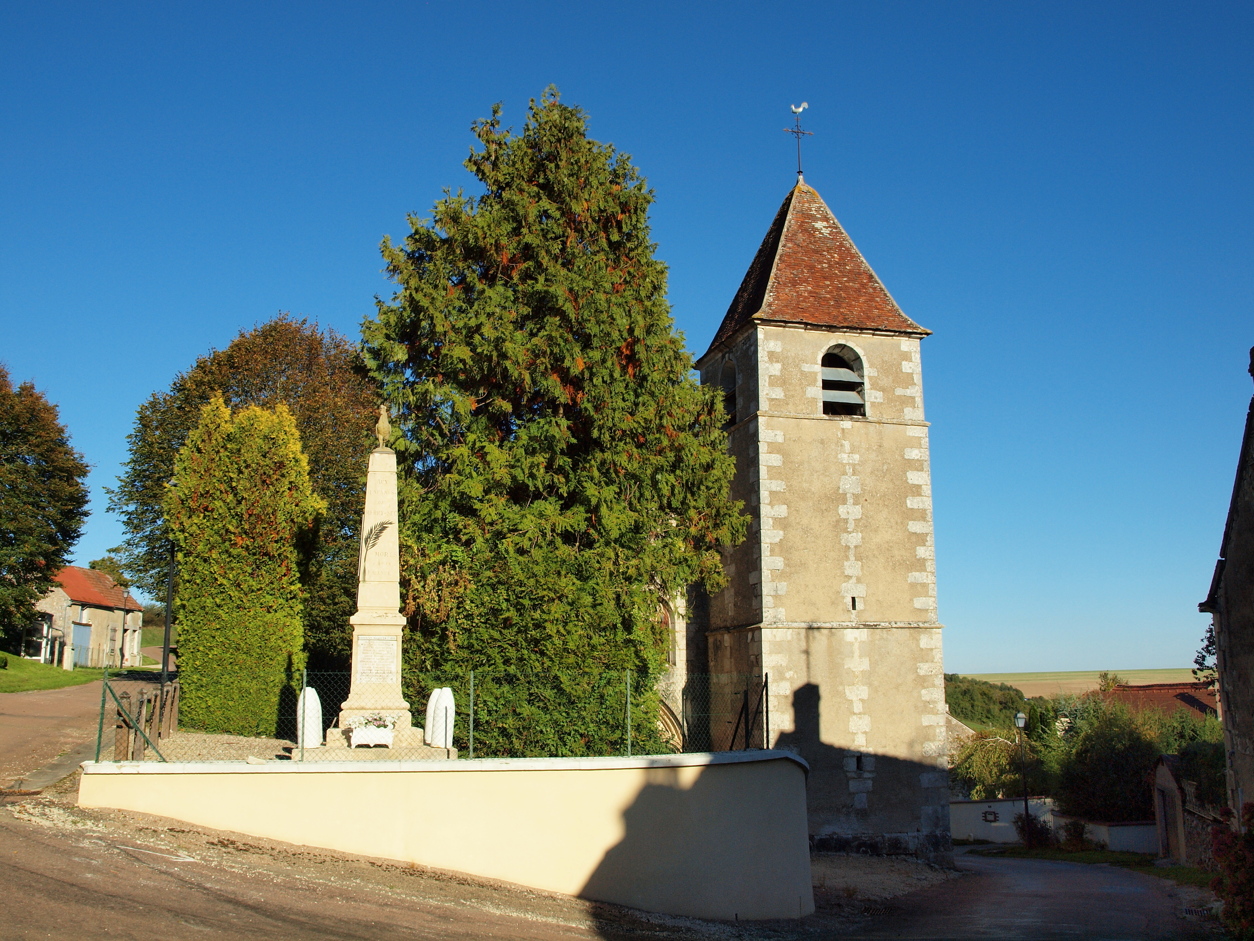 Église Saint-Menge de Merry-Sec (Yonne, France)